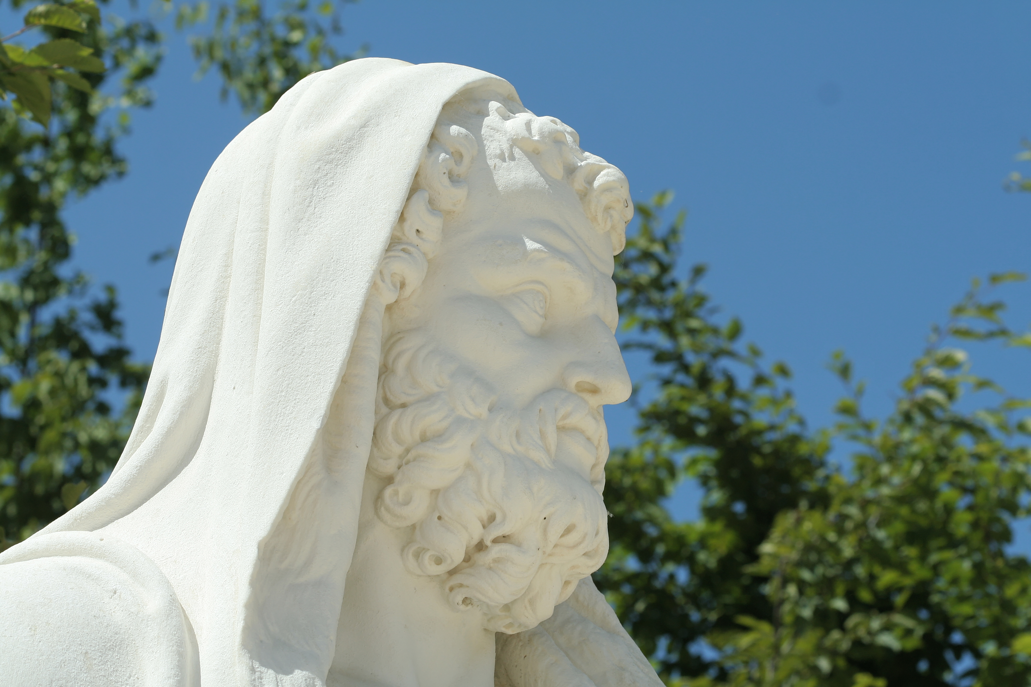 Parc de Versailles, Rond-Point des Philosophes. Théophraste, Simon Hurtrelle inv1850n°9454